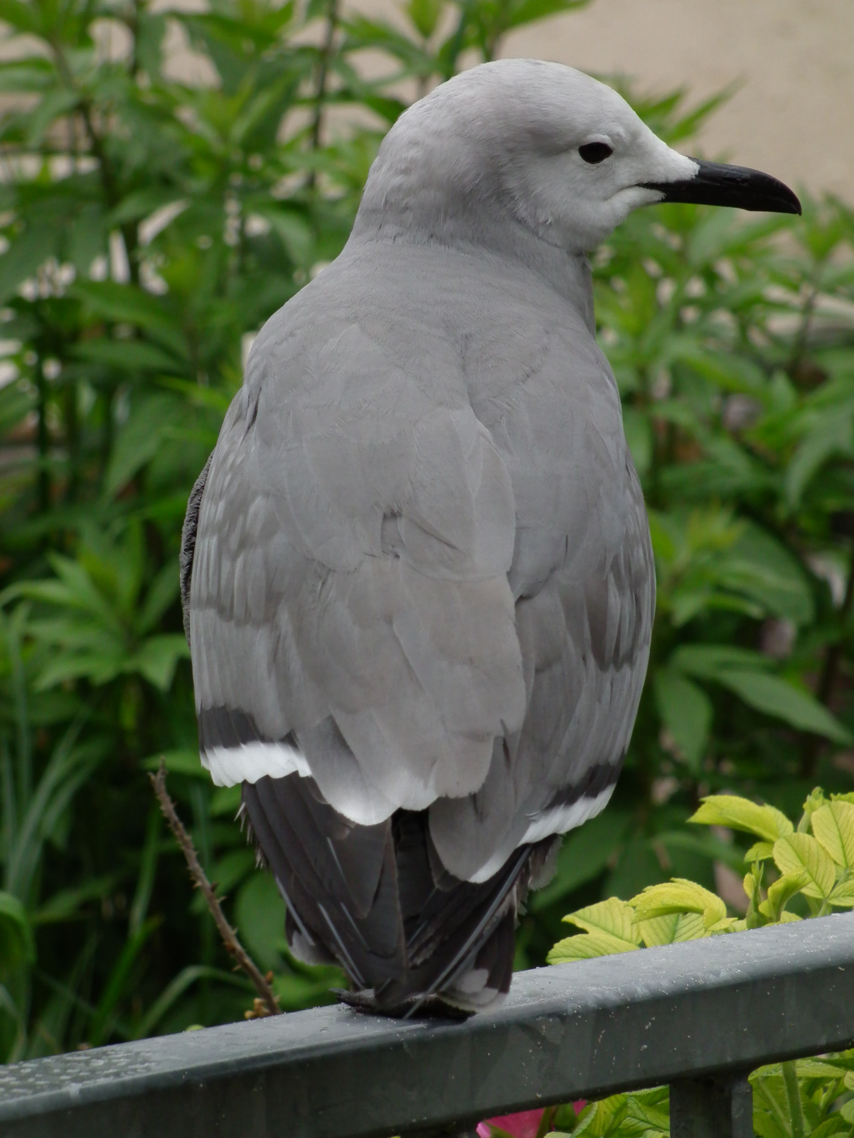 Graumöwe (Larus modestus), fotografiert im Tiergarten Heidelberg (Baden-Württemberg, Deutschland)